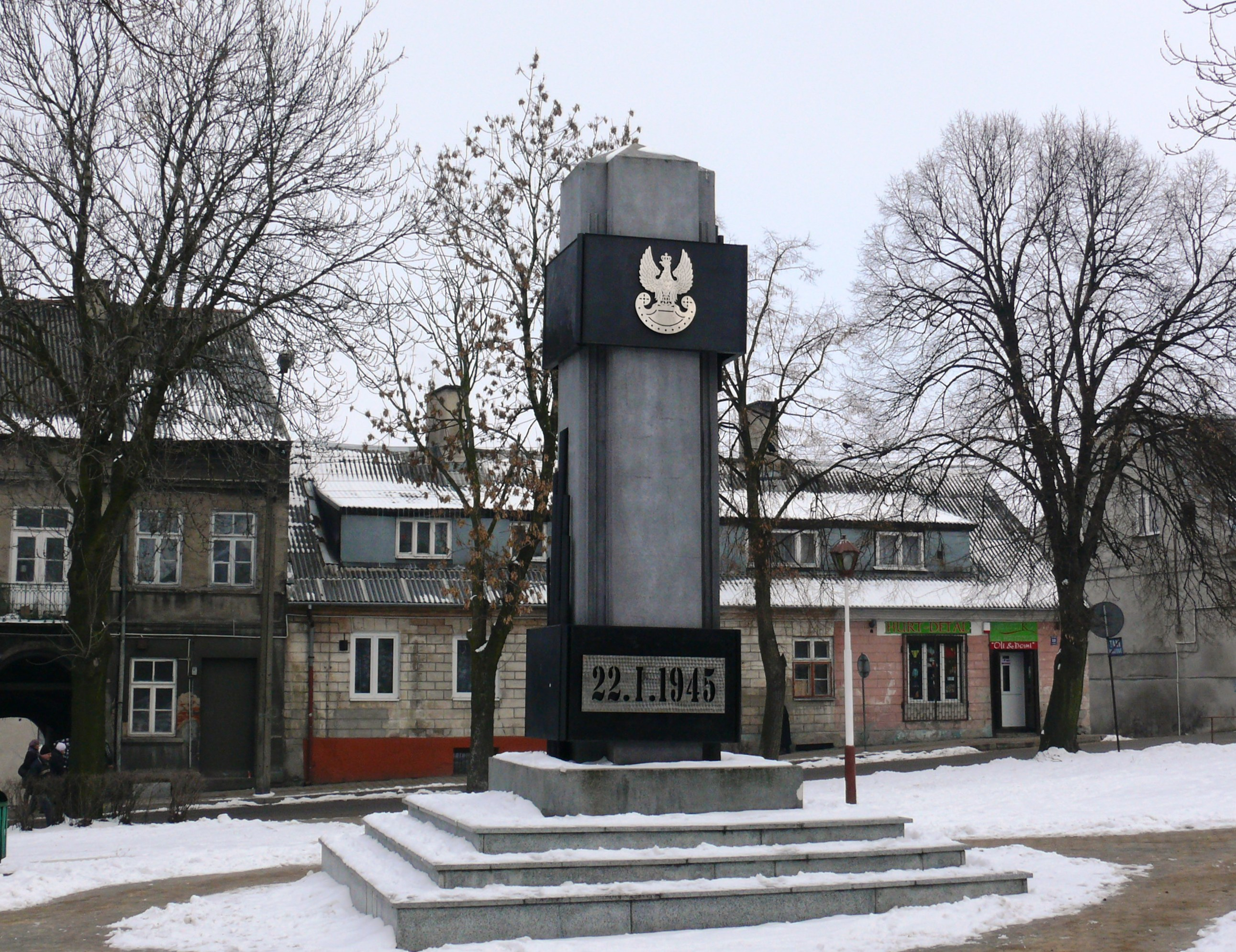 Pomnik Wyzwolenia Miasta Lipno na Placu Dekerta